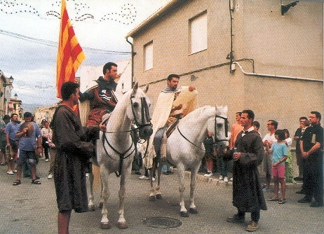 Pregó de la representació del Tractat d'Almizra a Camp de Mirra (Alt Vinalopó)